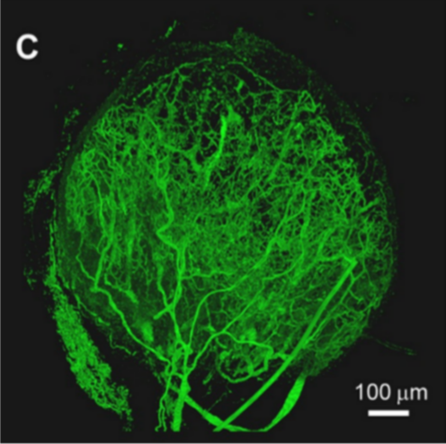 Fig. 1. Imágenes 3D detalladas de la red de conductos en un ganglio linfático completo. Las imágenes EVIS de un ganglio linfático (LN) poplíteo completo generaron una imagen de volumen en 3D. (C) La reconstrucción tridimensional de la imagen de todo el ganglio linfático muestra la vasculatura sanguínea ingresando por el hilio. Barra de escala= 100um.